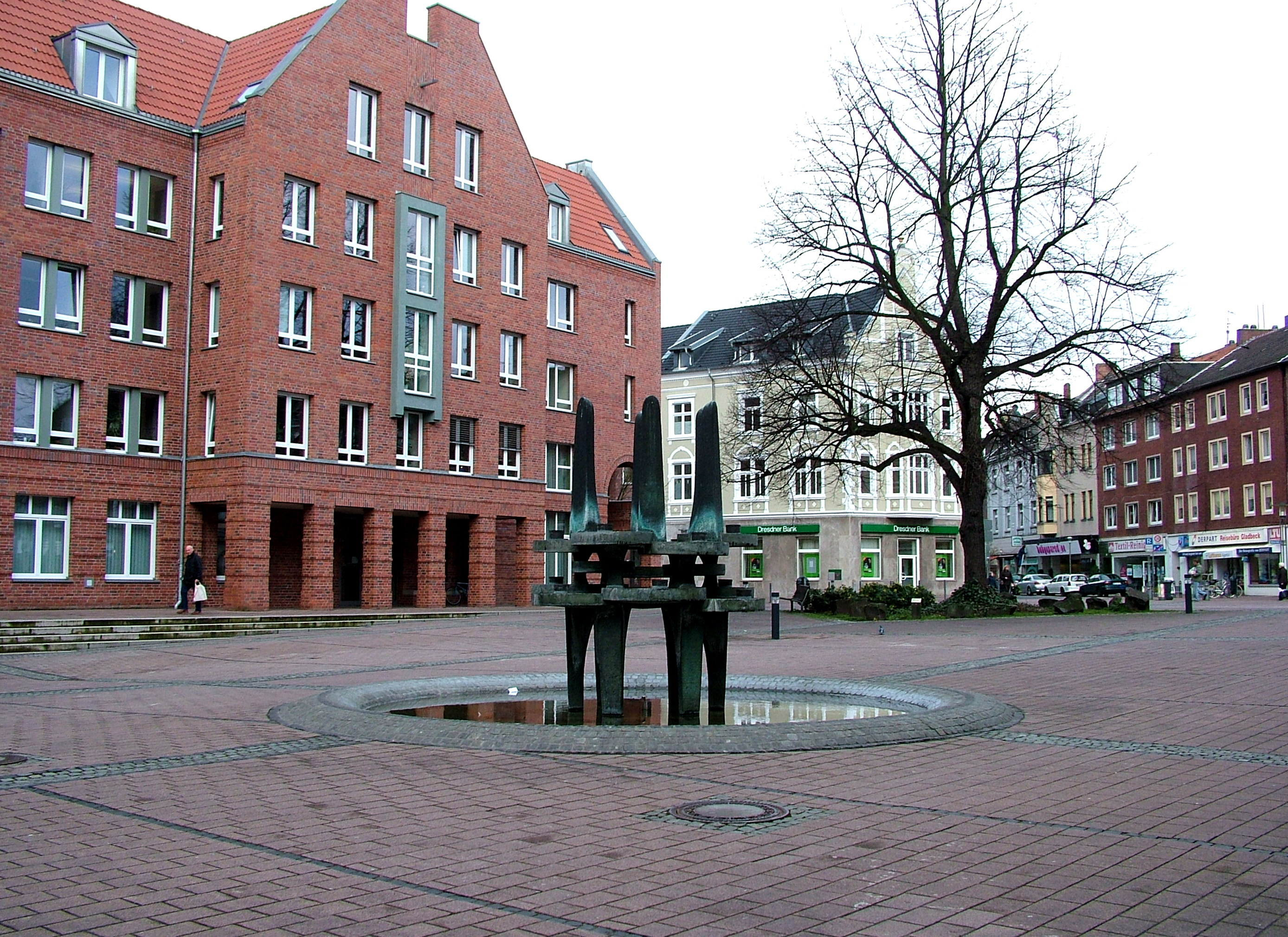 Riesenerbrunnen beim Rathaus von Gladbeck